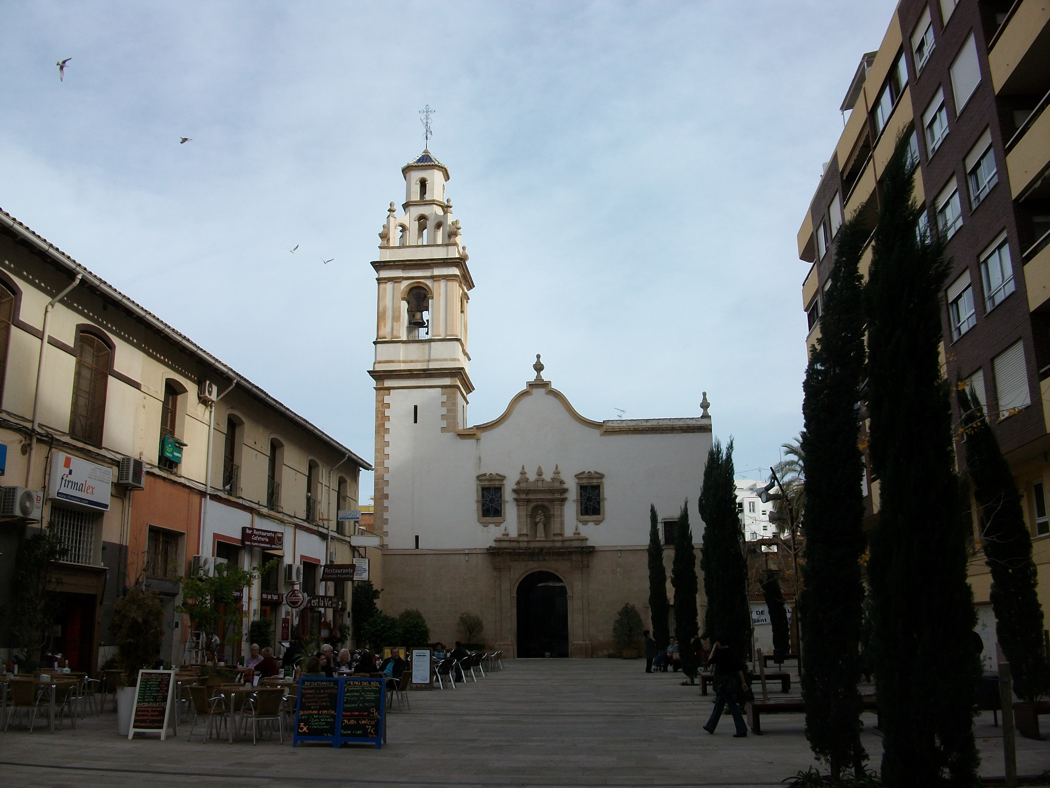 Convent de Sant Antoni de Dénia, plaça.